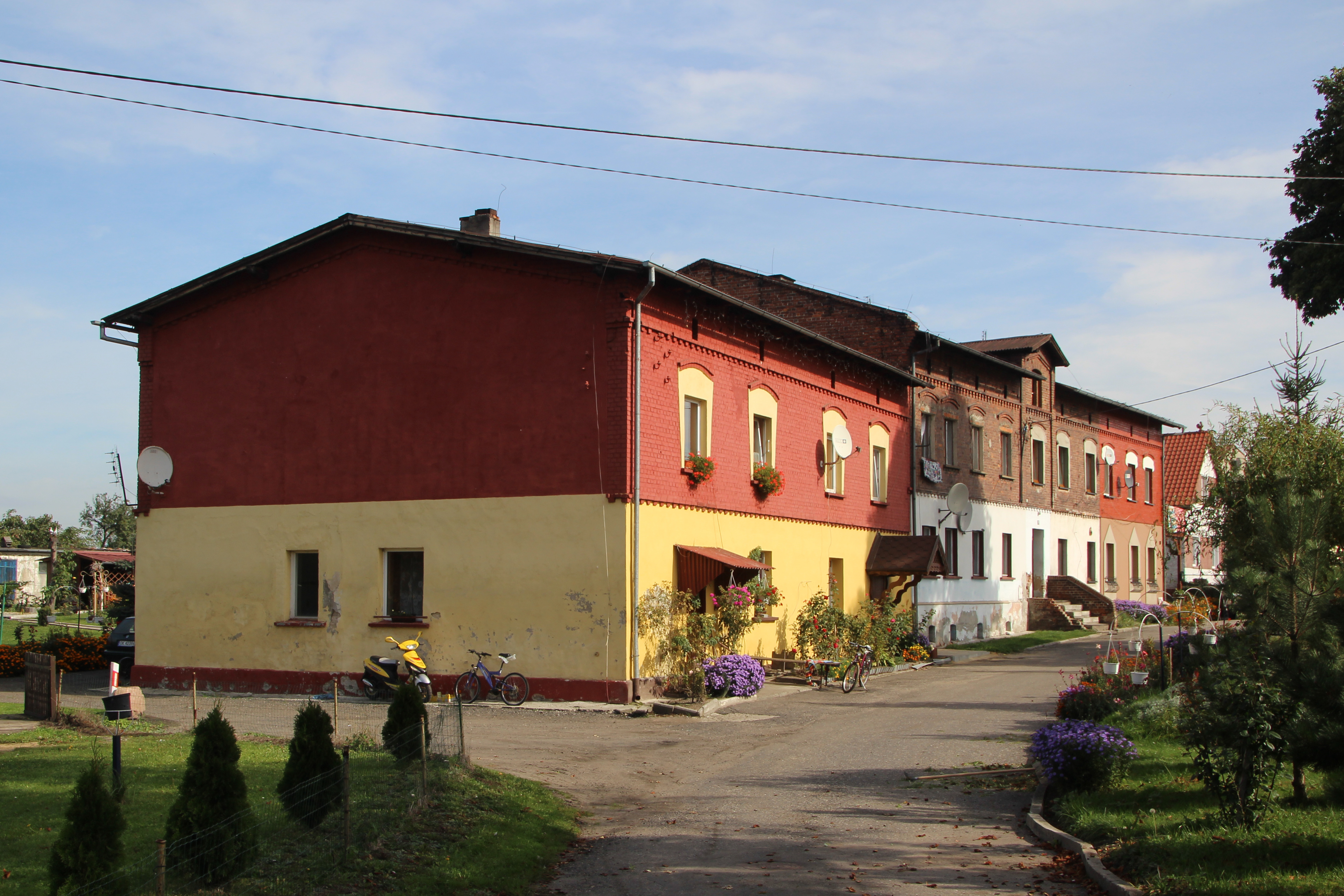 Ciężkowice (w j. niem. Czienskowitz) – wieś w Polsce położona w województwie opolskim, w powiecie kędzierzyńsko-kozielskim, w gminie Polska Cerekiew.